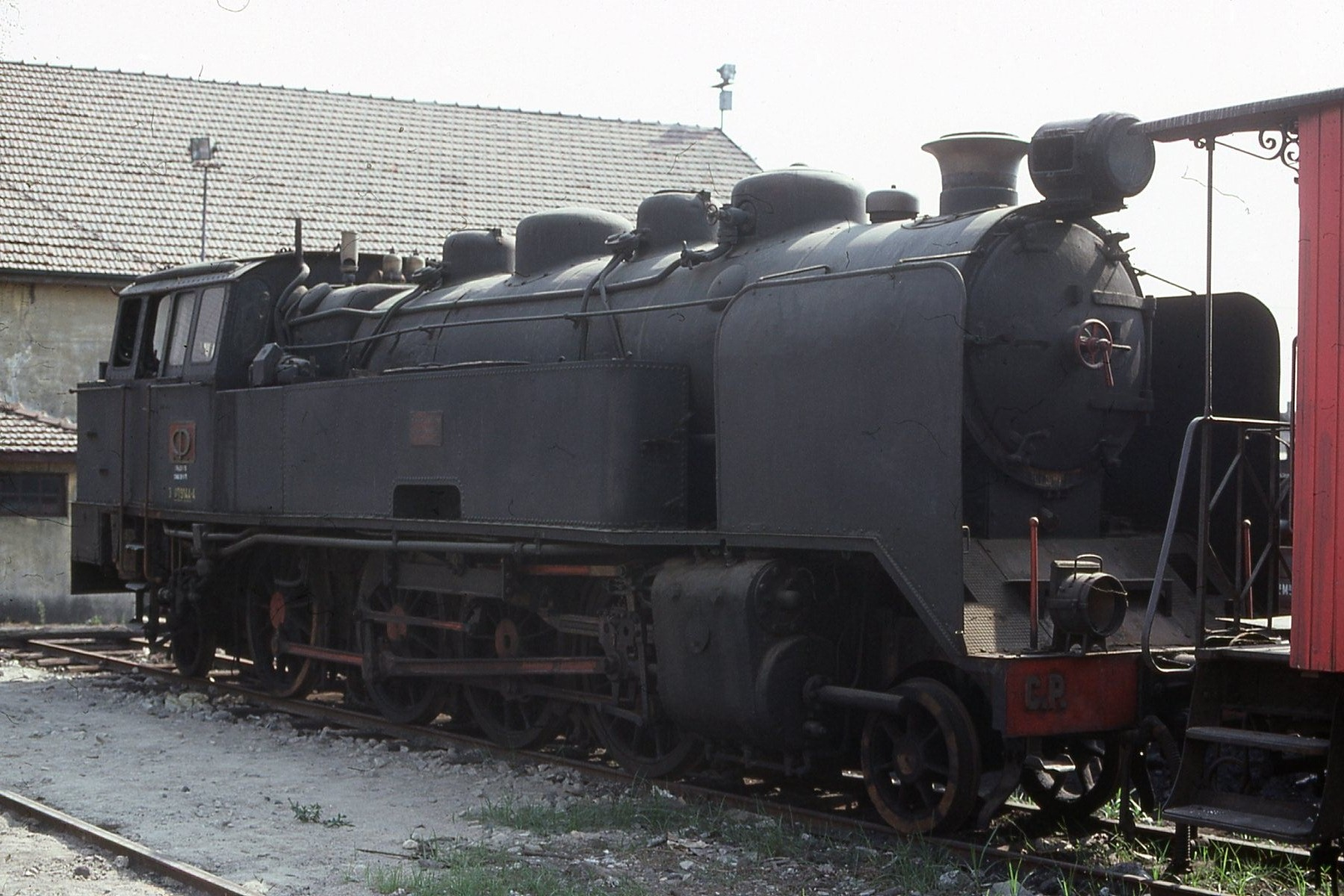 Photos: Trams aux Fils. J'ai pris cette photo en 1977 au Portugal dans une gare, j'ai oublier le nom de cette gare et je n'ai plus souvenir si c'est à Lisbonne ou Porto, informations bienvenues. Salutations. Eu tirei essa foto em 1977, em Portugal, em uma estação, eu esqueci o nome desta estação e eu já não me lembro se é em Lisboa e Porto, as informações de boas-vindas. Saudações.